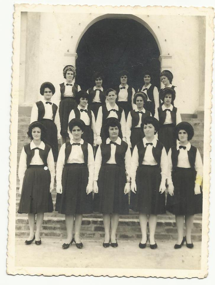 Primera promoción del Colegio Departamental Nuestra Señora de Lourdes (años 60)